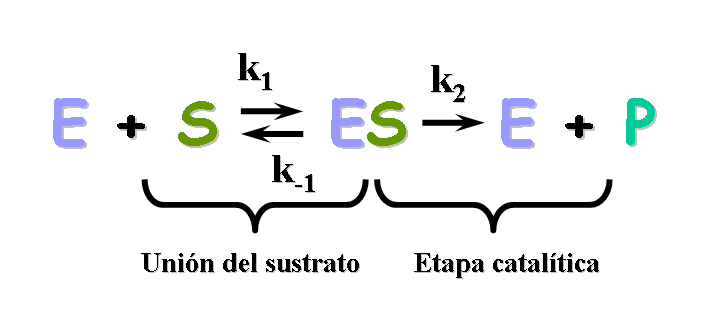 Equilibrio de una reacción enzimática con un único sustrato.